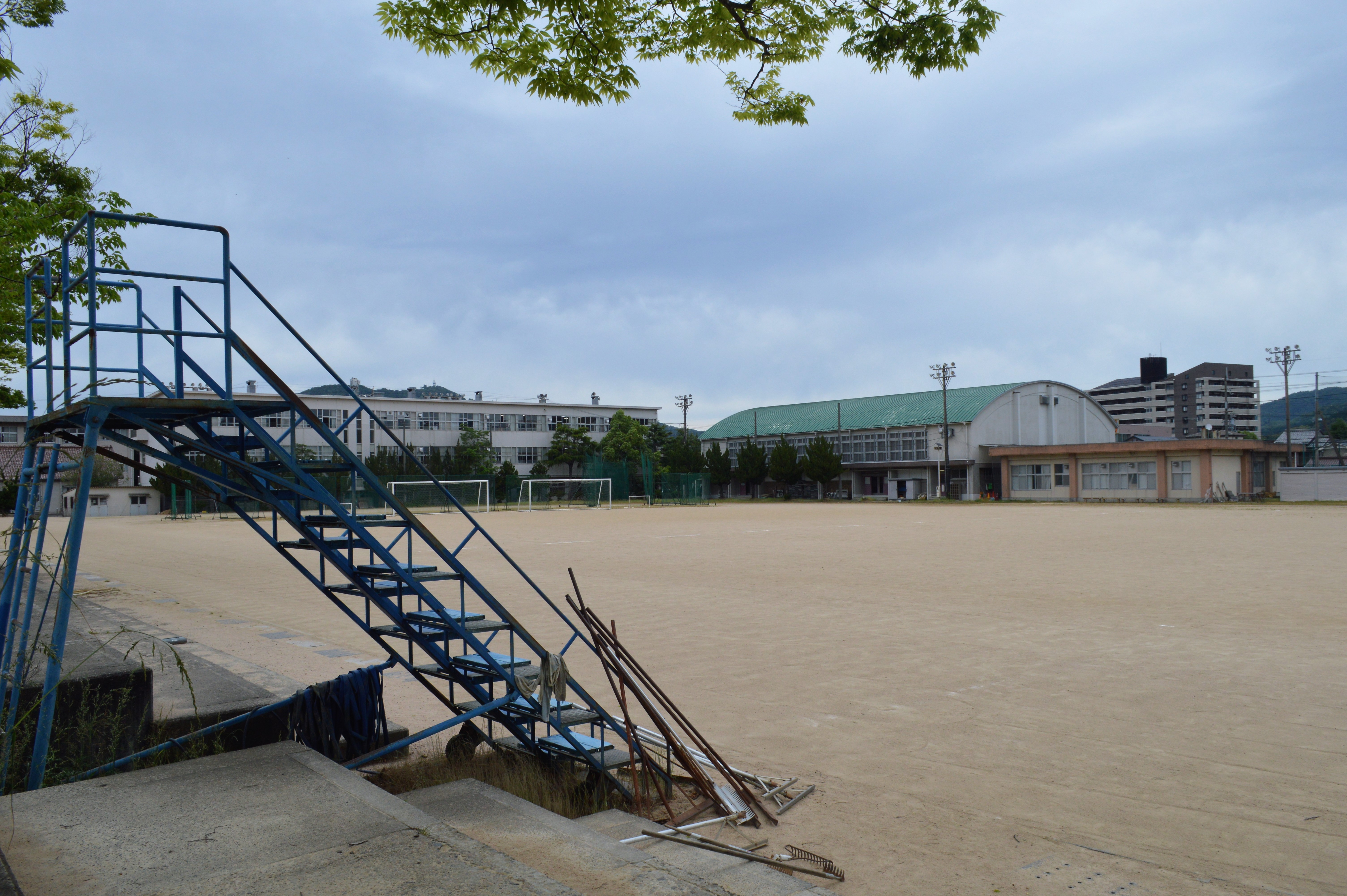 京都府舞鶴市字引土にある京都府立西舞鶴高等学校（京都府立西舞鶴高校）。